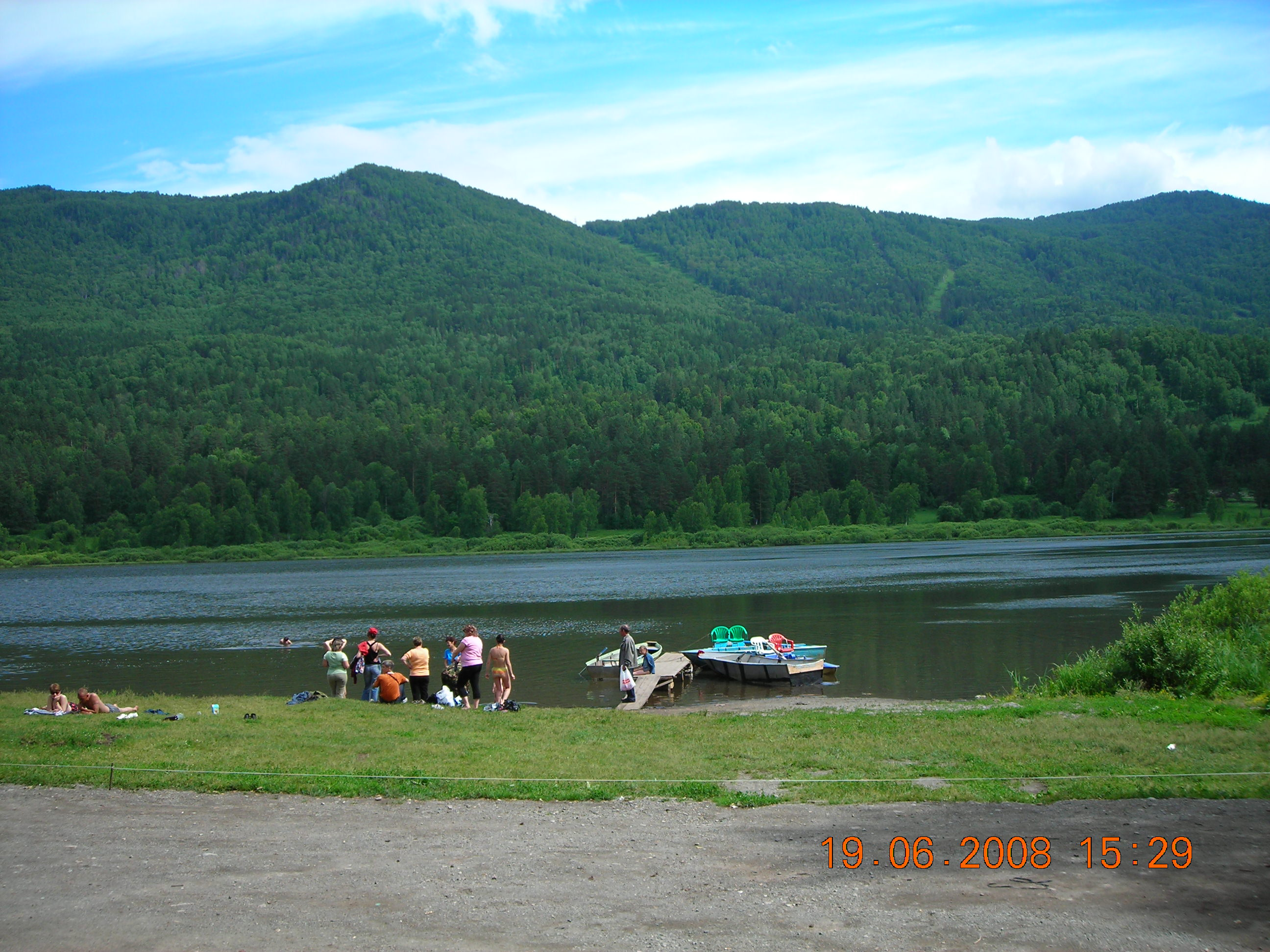 озеро Манжерок